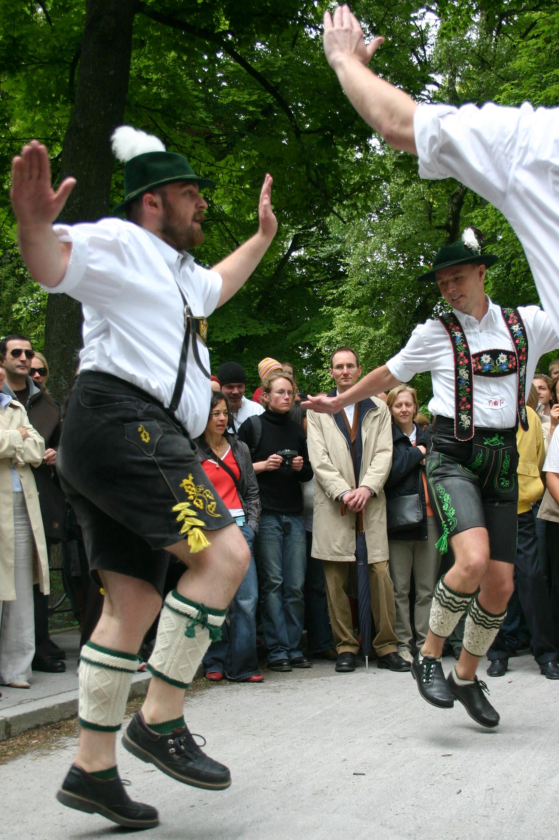 D'Schwuhplattler bei Paul McCarthy's Westernparade in München